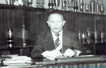 Archiwalne zdjęcie z archiwów I Liceum Ogólnokształcącego im. Stanisława Dubois w Koszalinie.